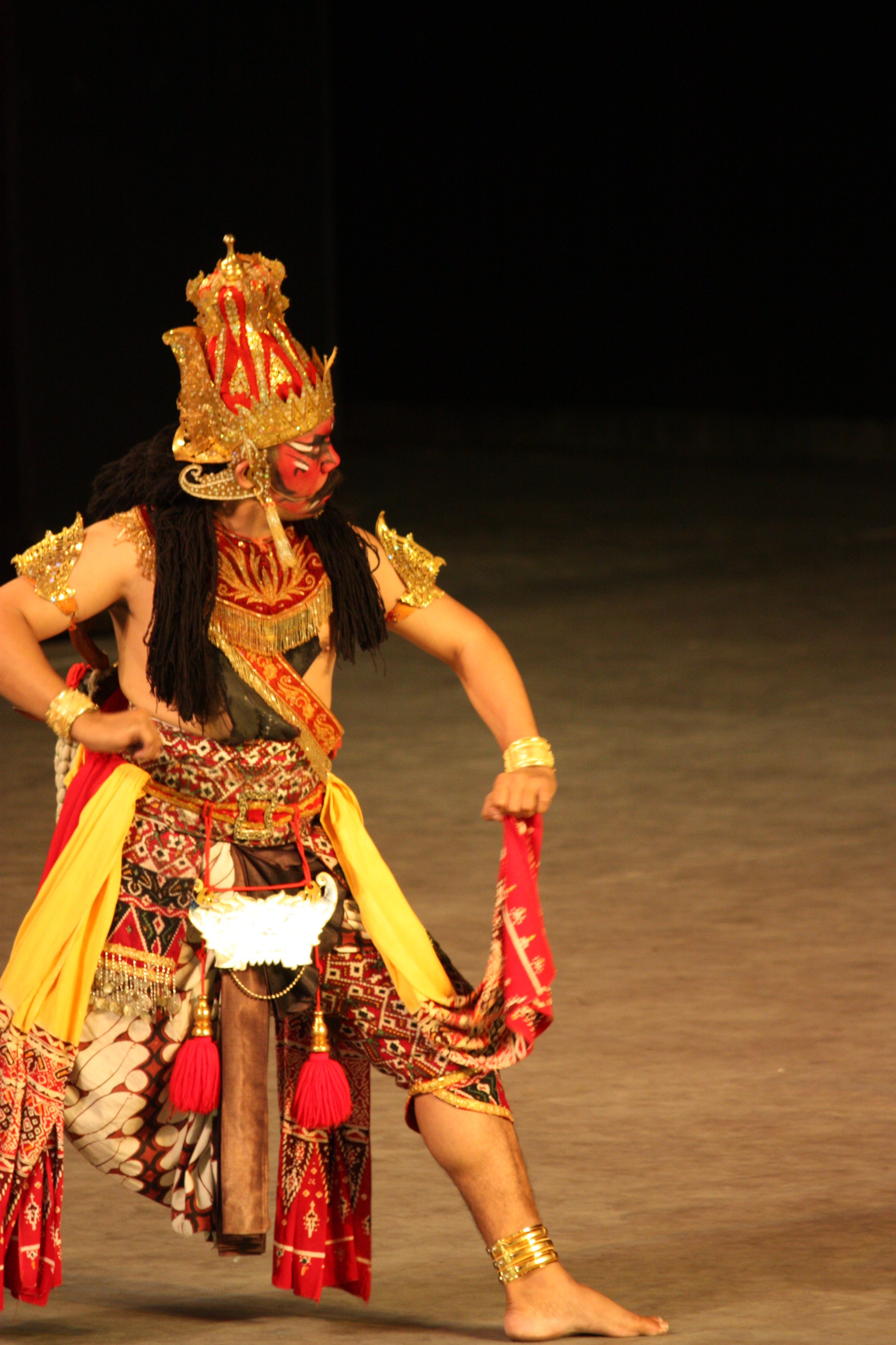 Prambanan Ramayana ballet, Ravana